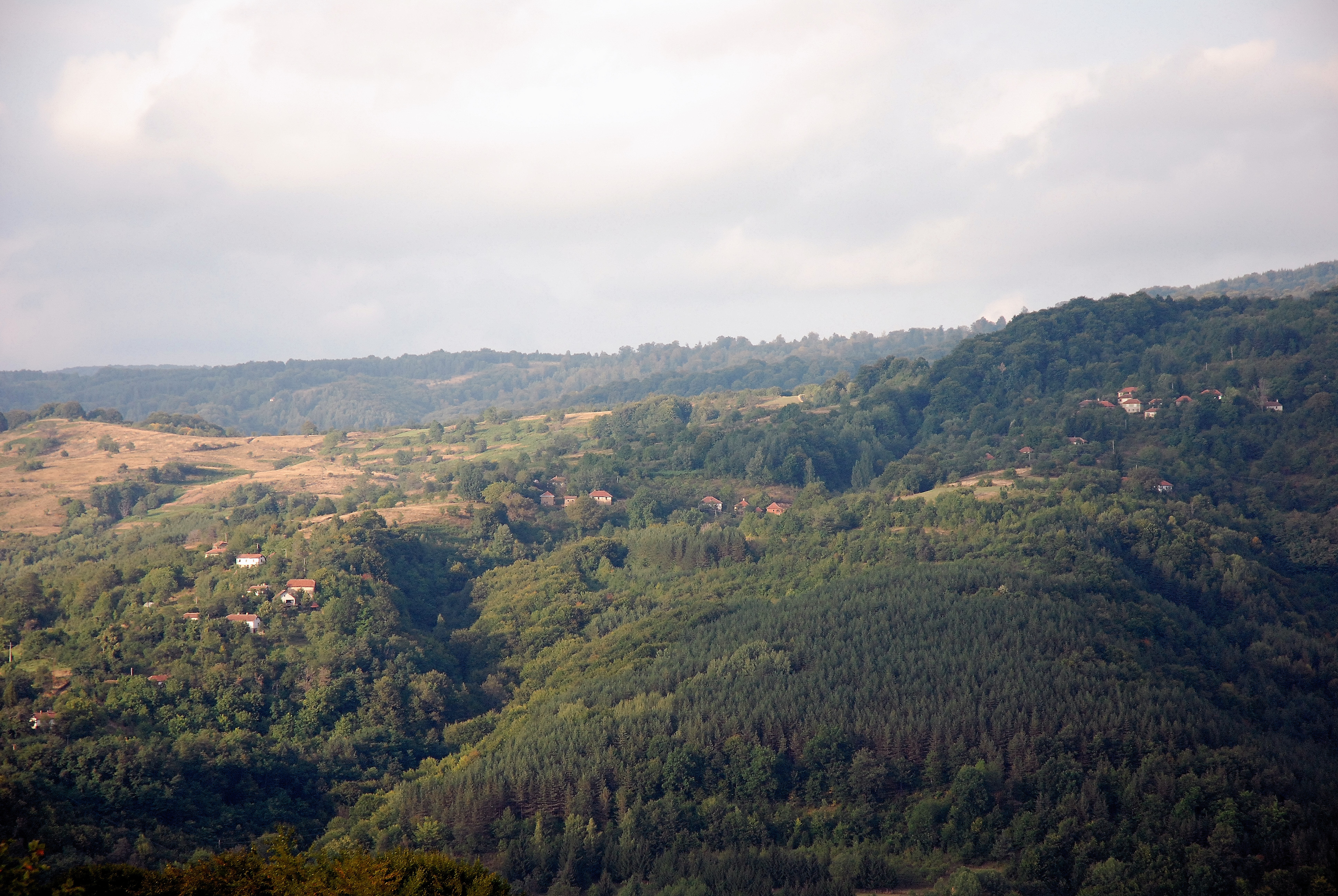 Zaseoci Mačkatice